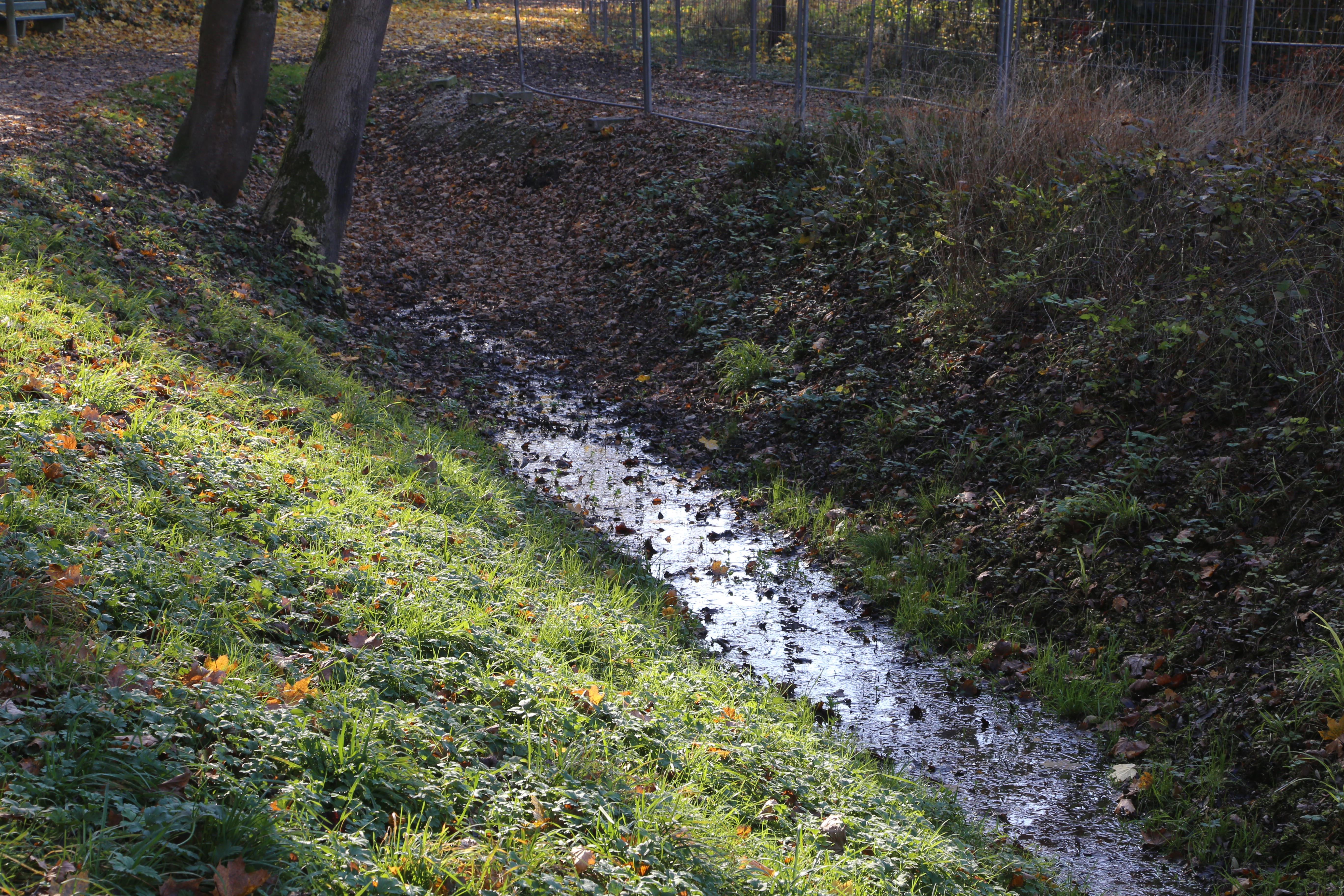 Quelle des Brunnbachs (rechter Zufluss der Isar), ca. 200 m nördlich des Isarrings, München